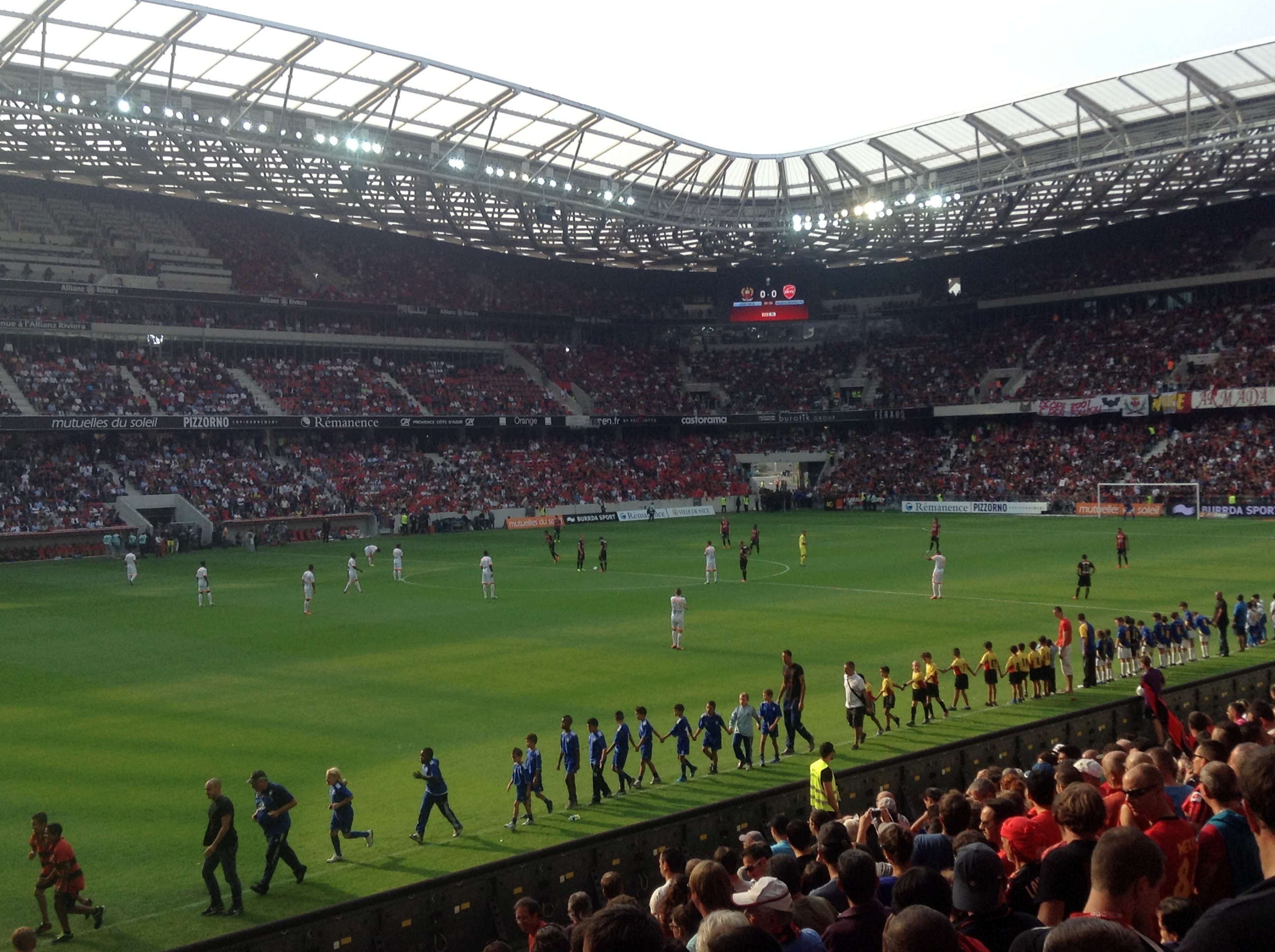 L'Allianz Riviera le jour de son inauguration.